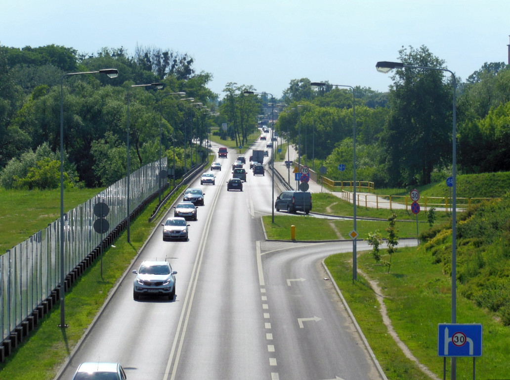 Ulica Ludwikowo w Bydgoszczy - dojazd do Węzła Zachodniego